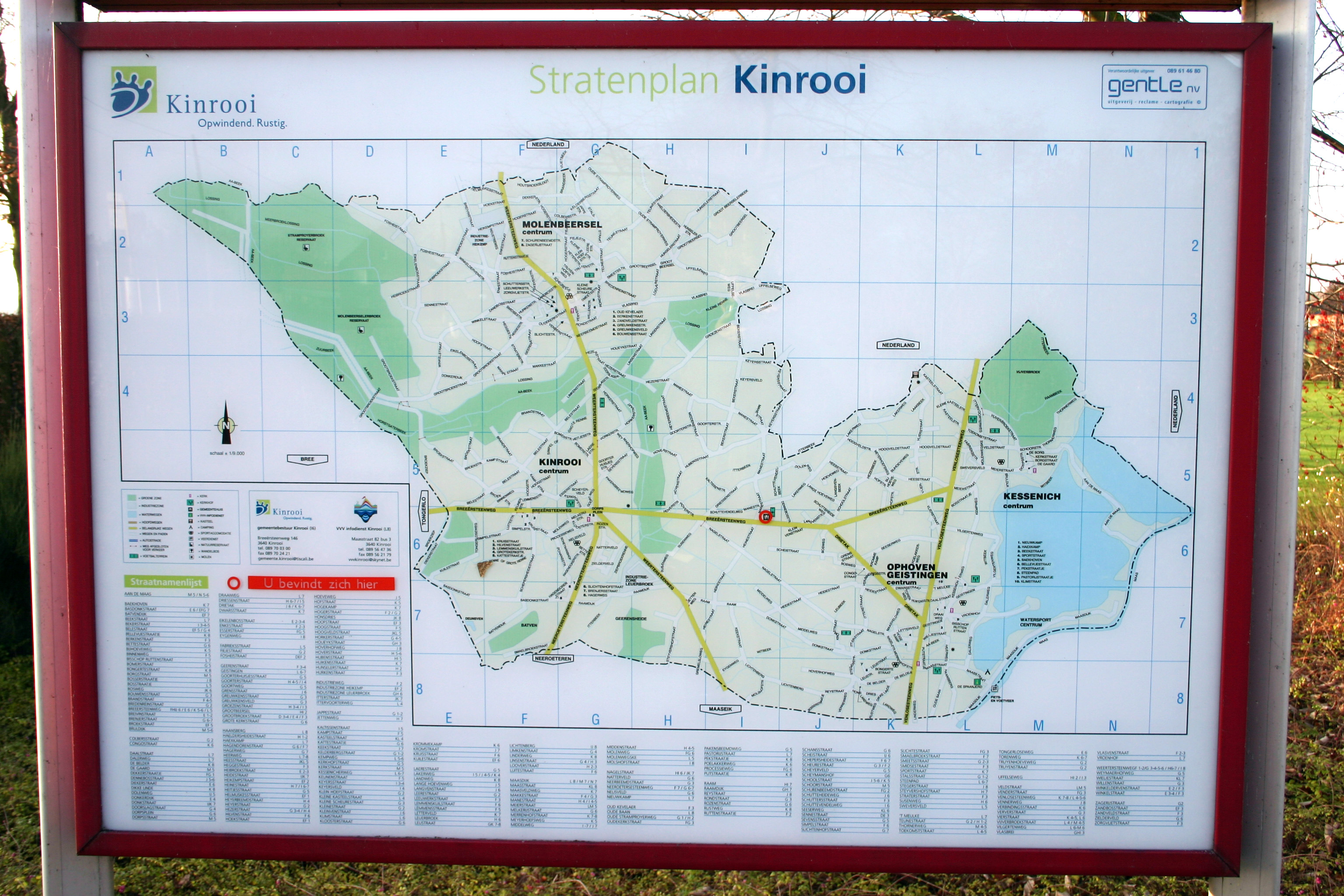 Stratenplan van Kinrooi (Belgium)